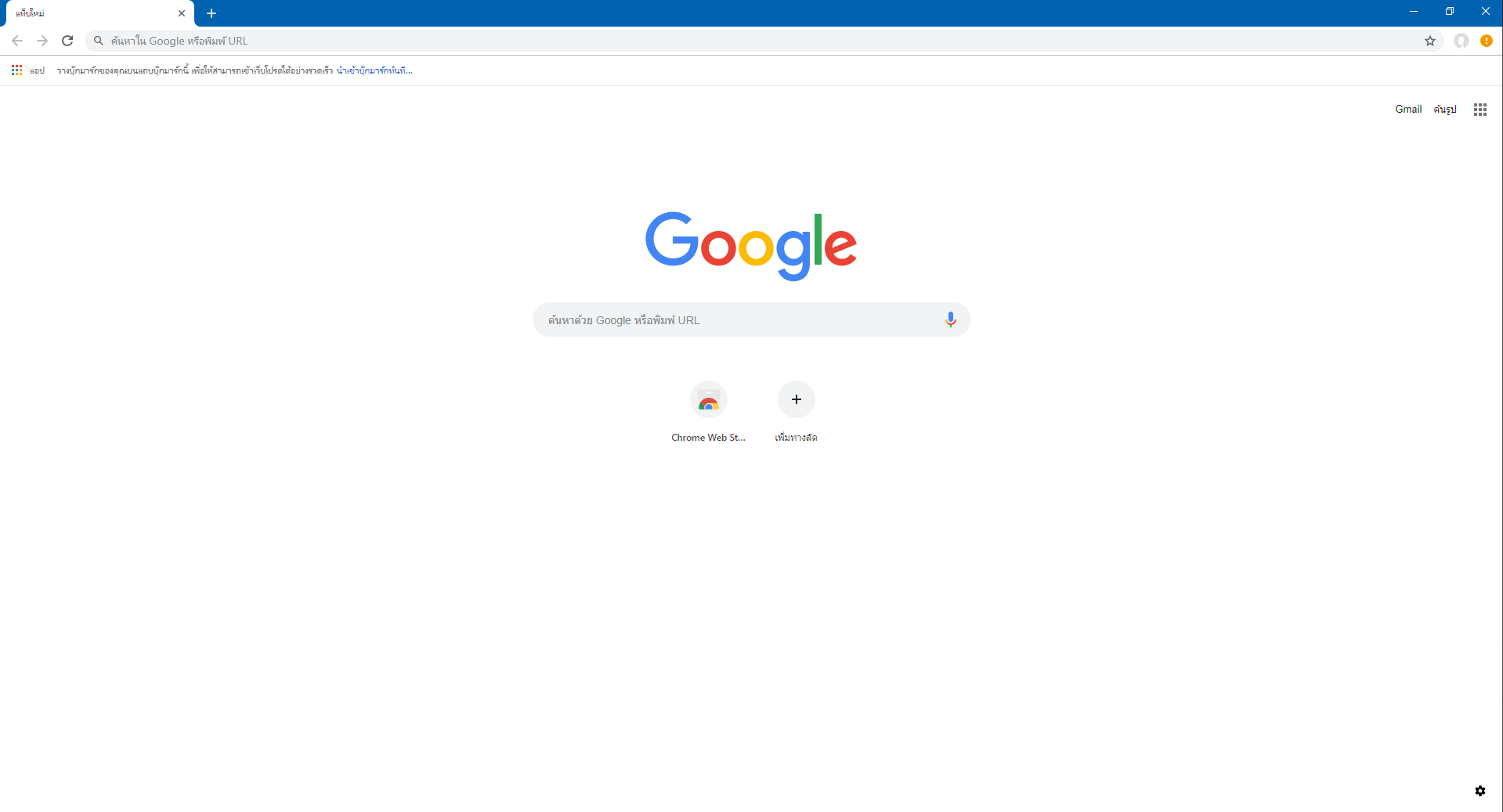 Chrome รูปร่างใหม่